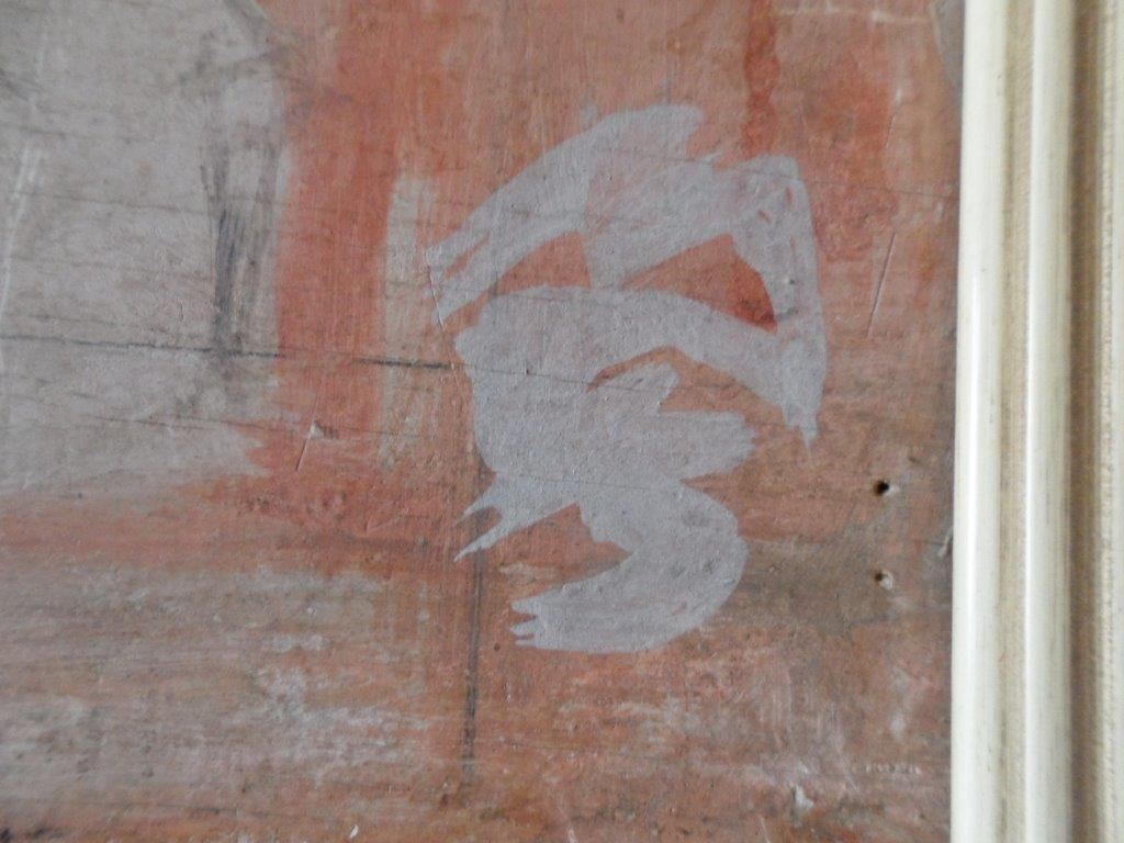 Signatur des deutschen Künstler und Politikers Konrad Schmid-Meil ((* 9. April 1909 in Weingarten; † 1. Februar 1969 in München).